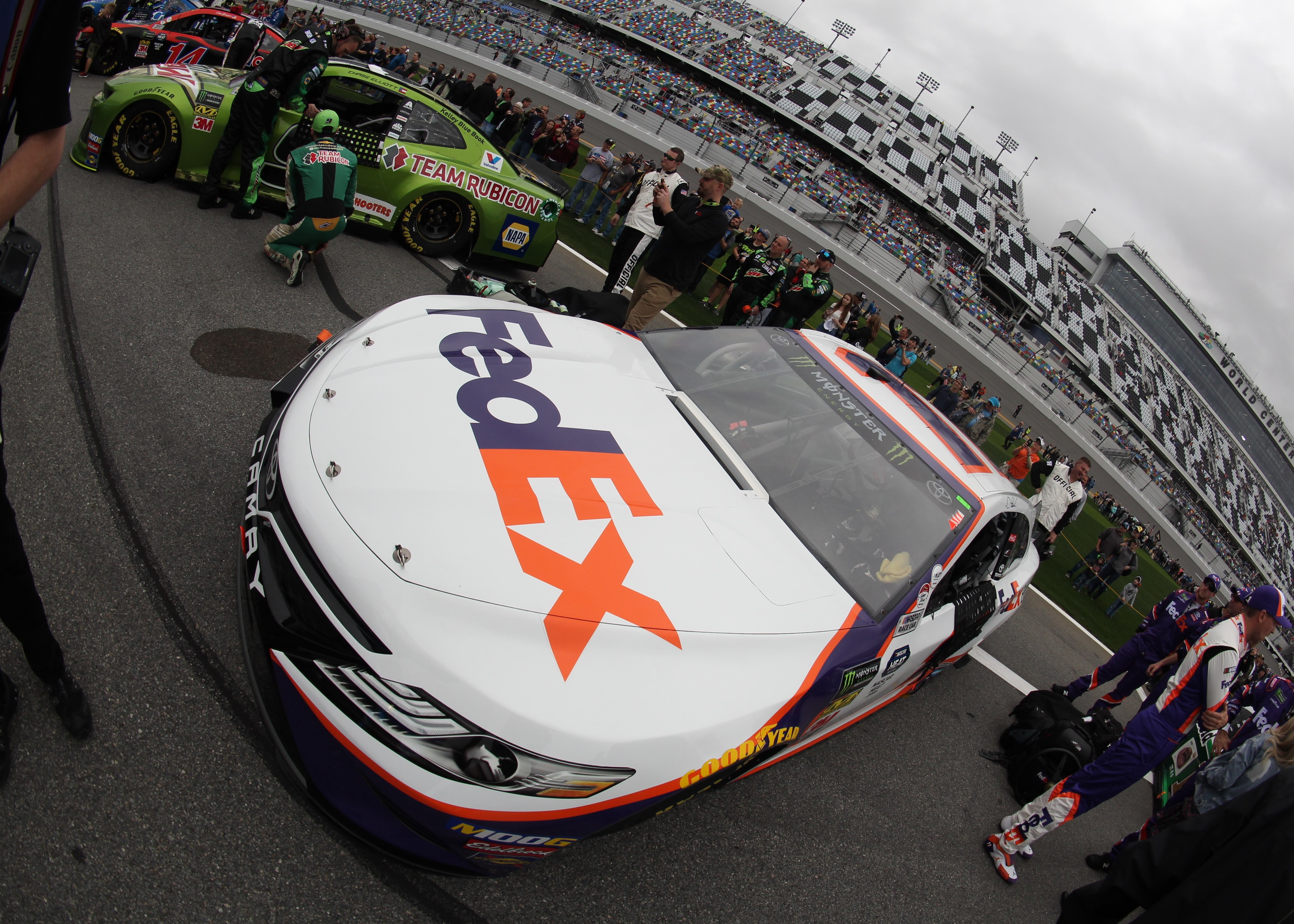 2019 Daytona 500